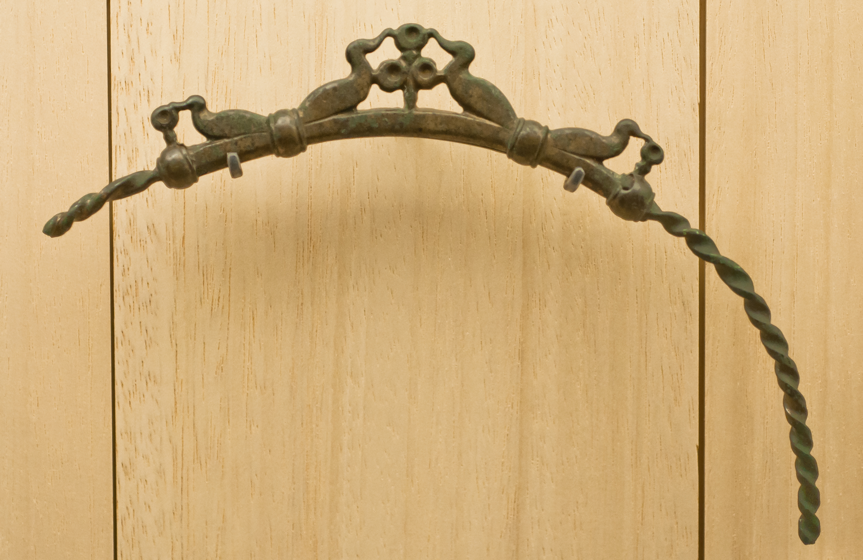 Torque à motifs d'oiseaux de l'âge du bronze, retrouvé à Breuvery (Marne) Collections du Musée d'Archéologie Nationale